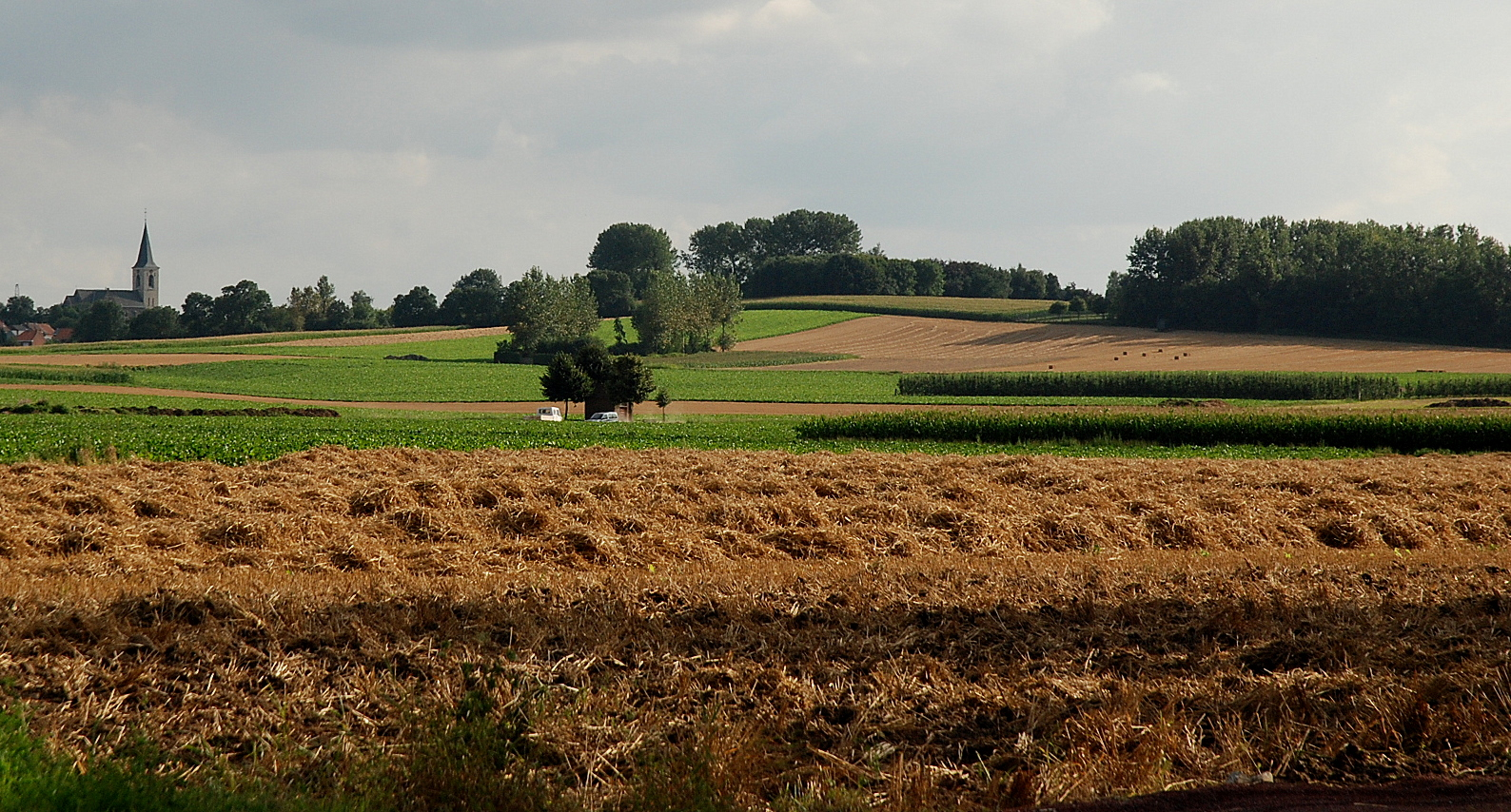 De Sieberg te Herderen, op de foto rechts van de kerk van waar Lodewijk XV van Frankrijk toekeek tijdens de slag bij Lafelt